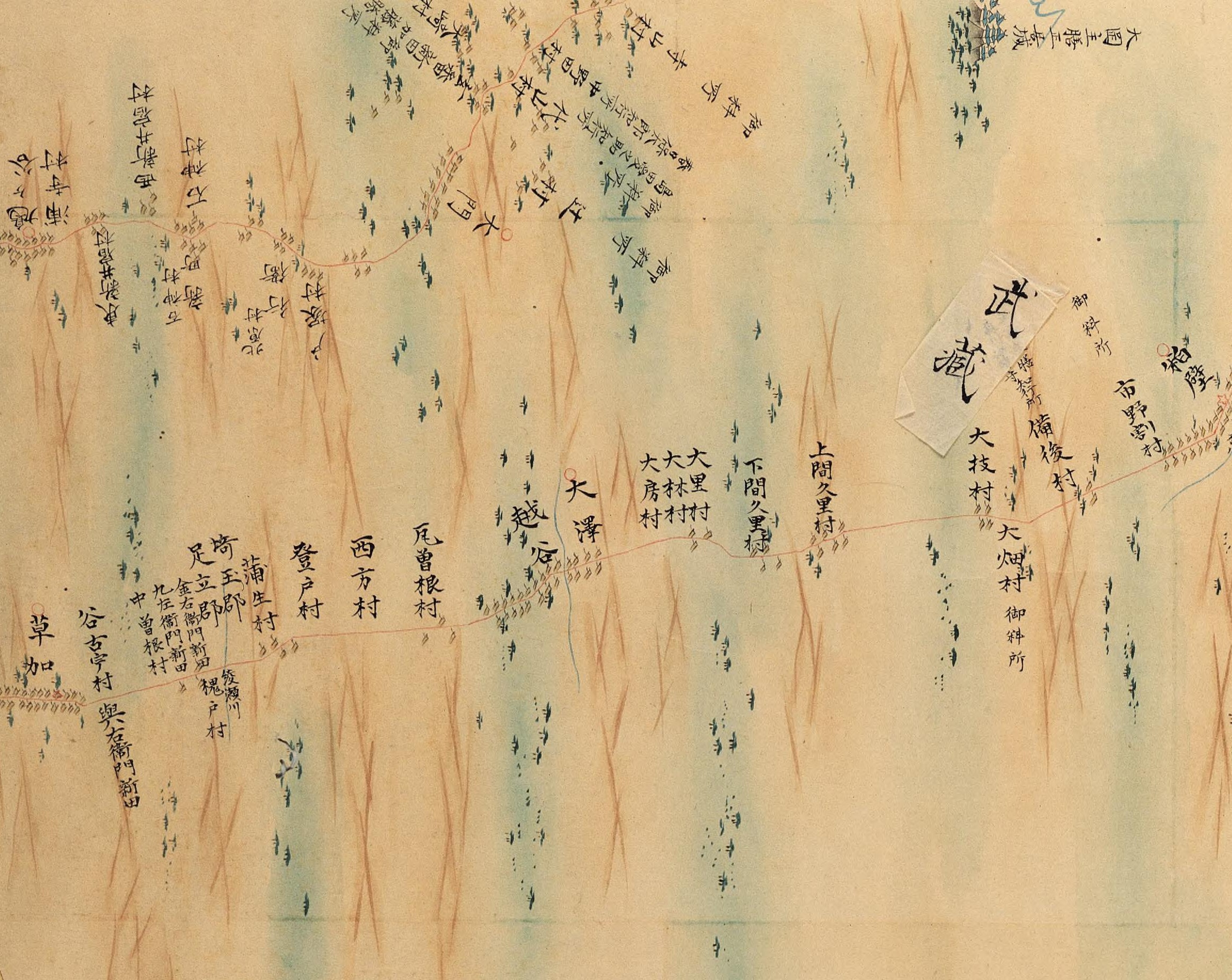 改変図、越谷・大澤周辺、江戸時代、日光・奥州街道の宿場町。 〔大日本沿海輿地全図 〕. 第90図 武蔵・下総・相模(武蔵・利根川口・東京・小仏・下総・相模・鶴間村)